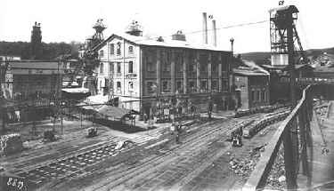 Grube Itzenplitz (Heiligenwald) Schächte I-III